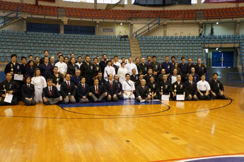 1º Campeonato Brasileiro de Iaido